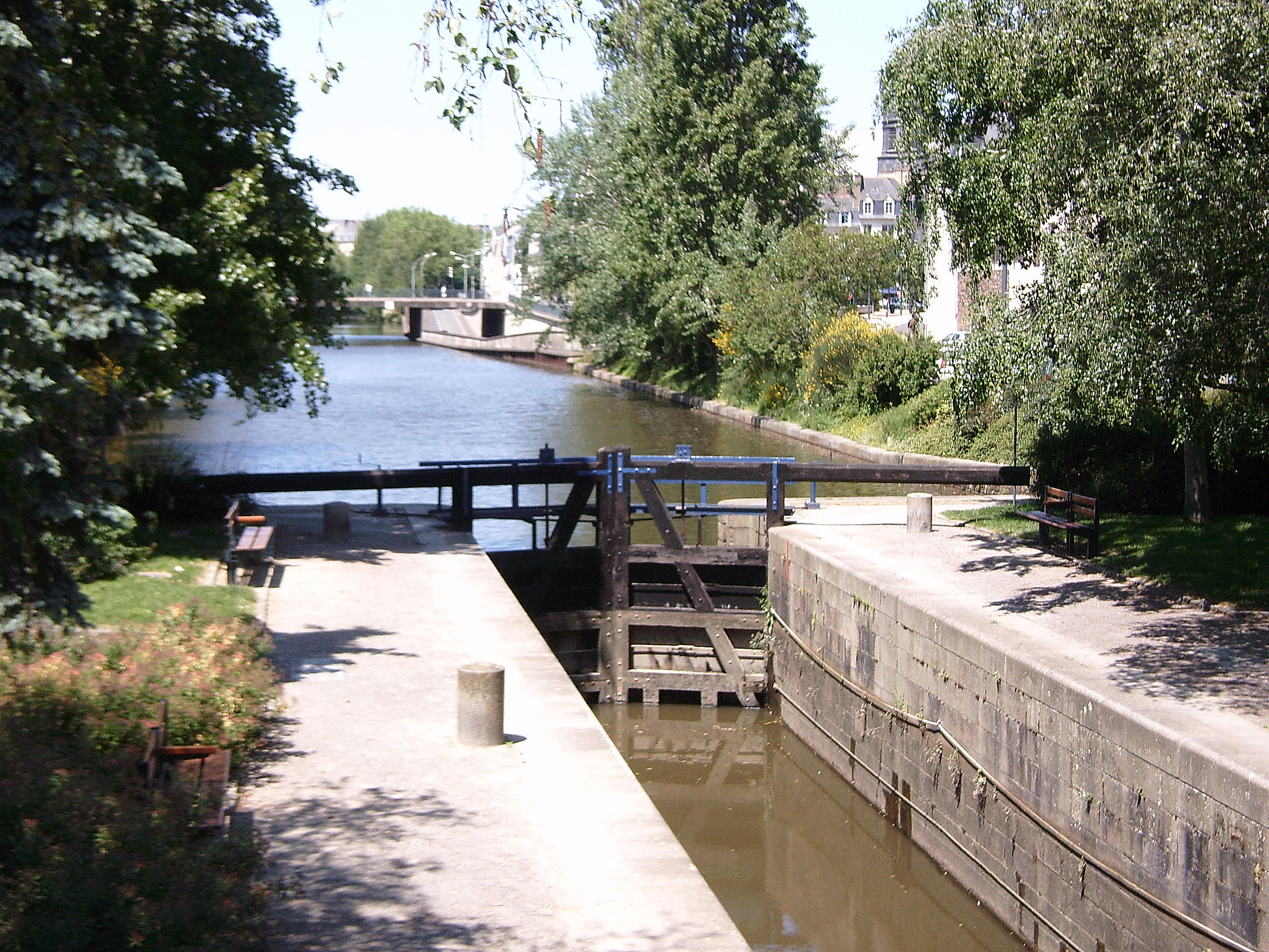 Das Mündungsstück des Canal d’Ille-et-Rance und die letzte Schleuse zur Vilaine.